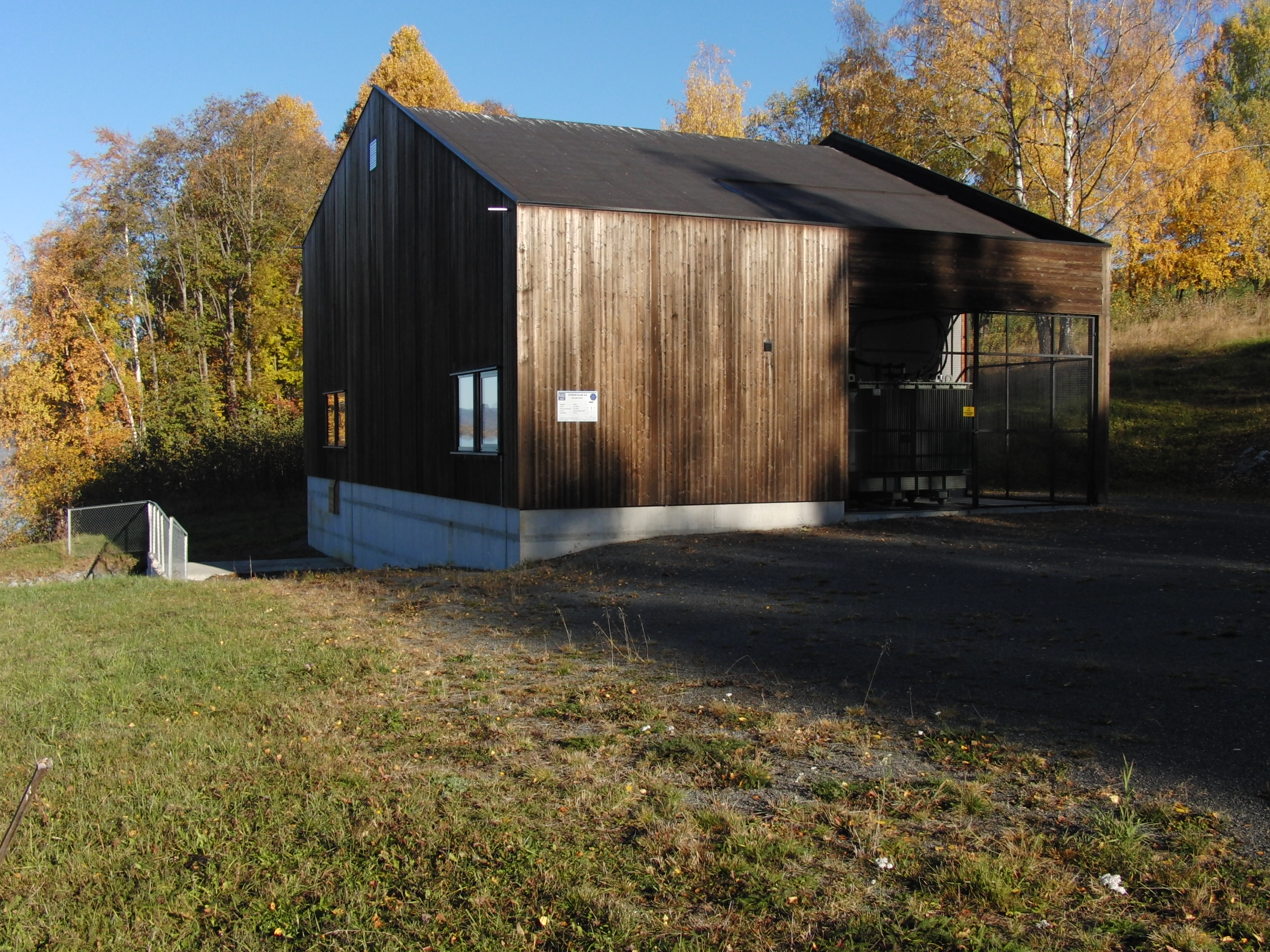 Fall kraftverk